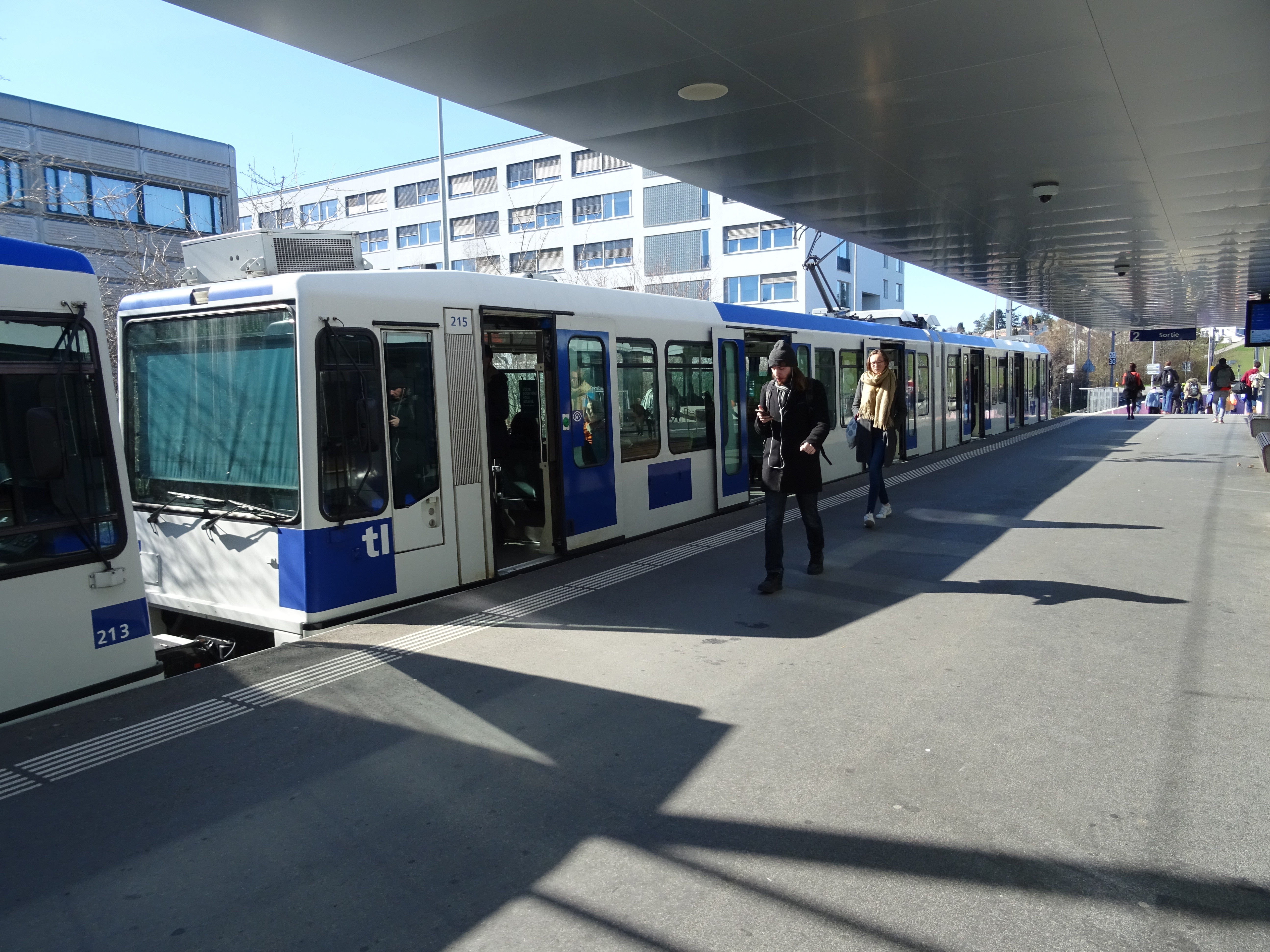 Rame à quai à la station EPFL du métro 1 de Lausanne.